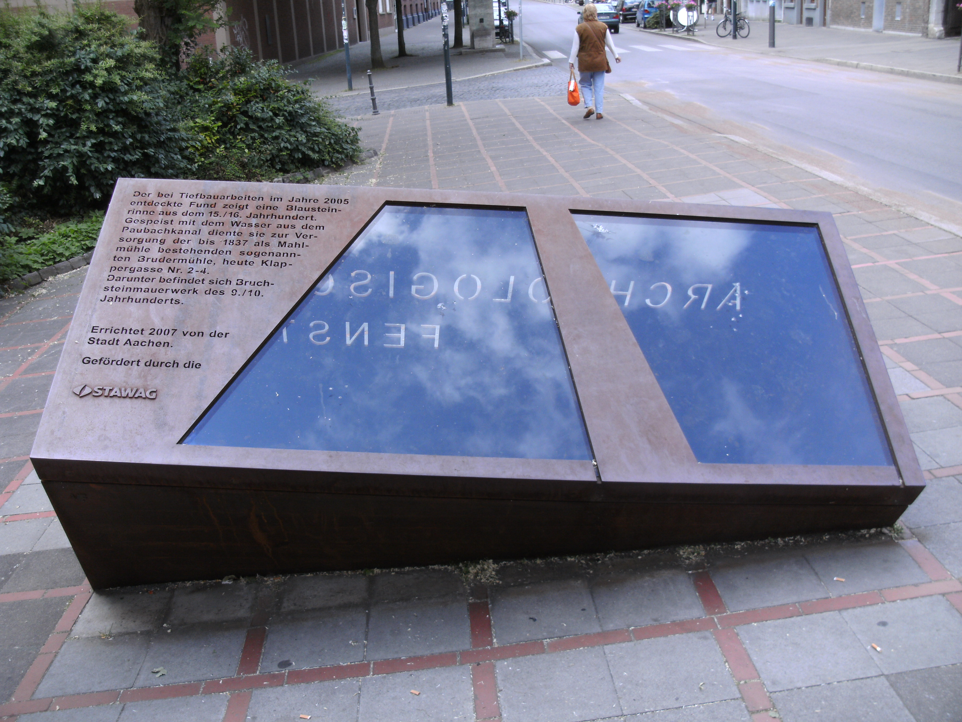 Archäologisches Fenster mit ehemaligem Paukanal in Aachen (Klappergasse)